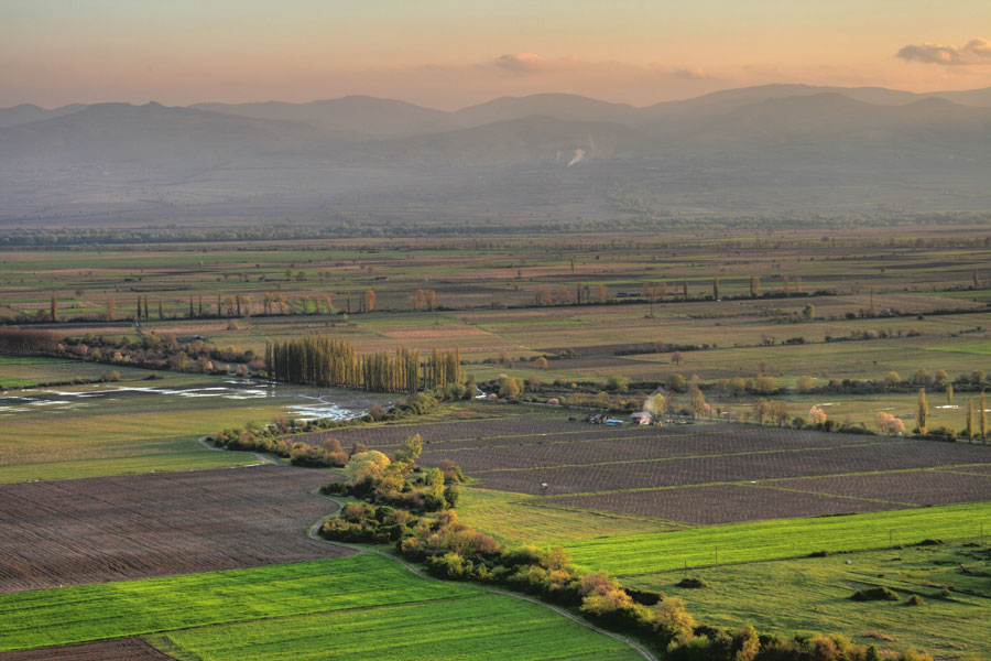 Alazani Valley